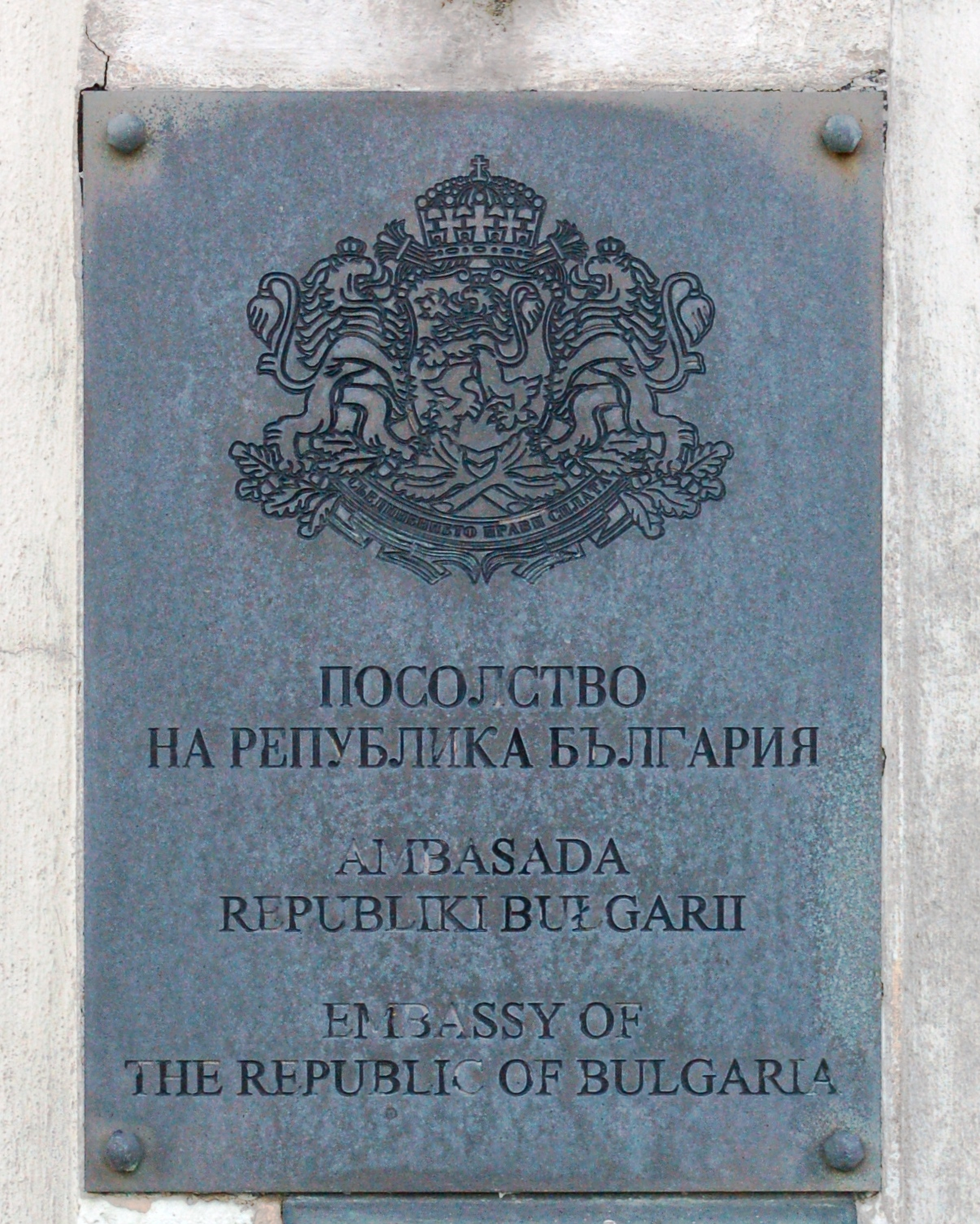 Warschau, Bulgarische Botschaft in Warschau